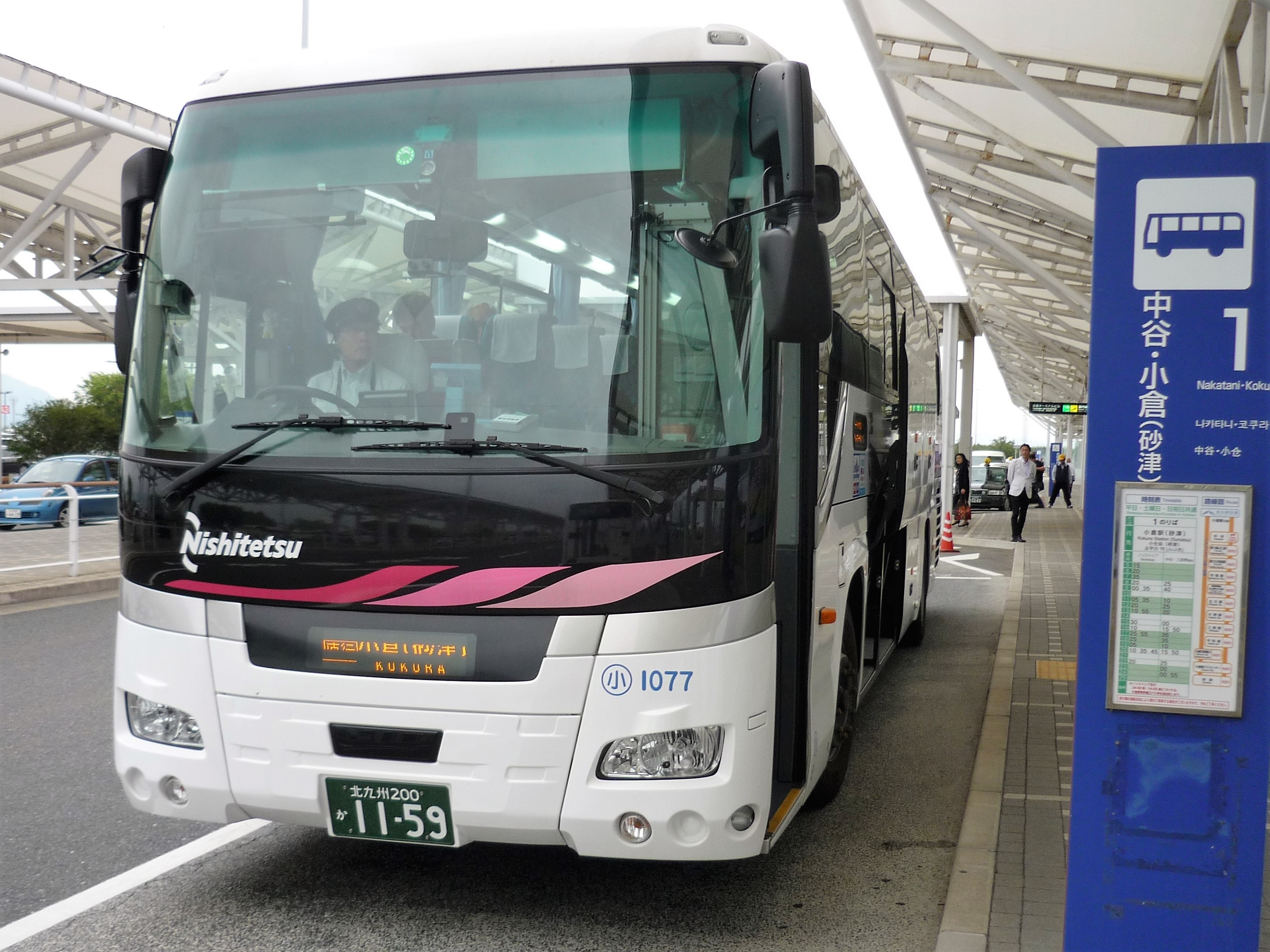 北九州空港に停車中の北九州空港エアポートバス小倉駅行き